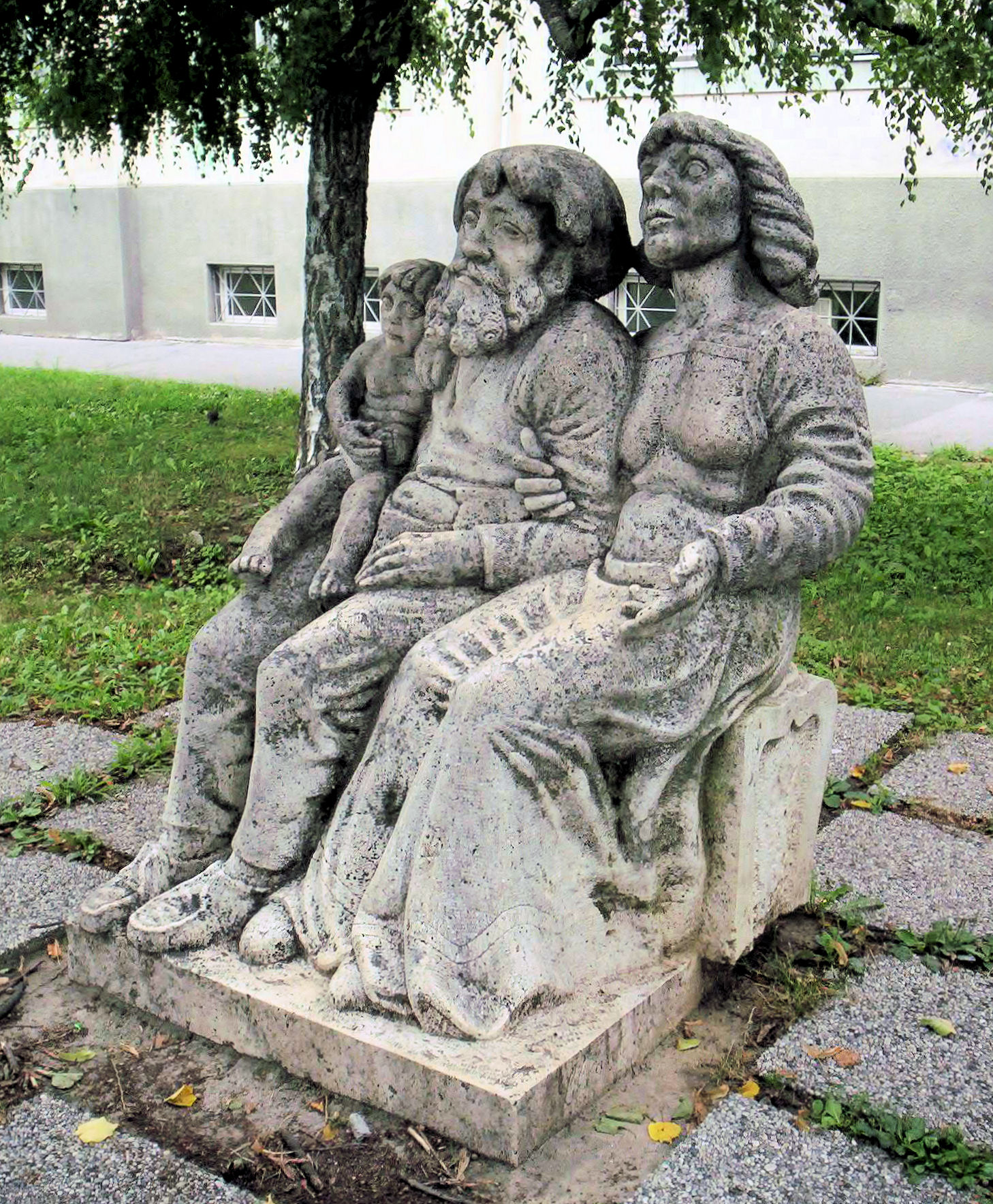 Lóránt Zsuzsa Család című szobra Szegeden